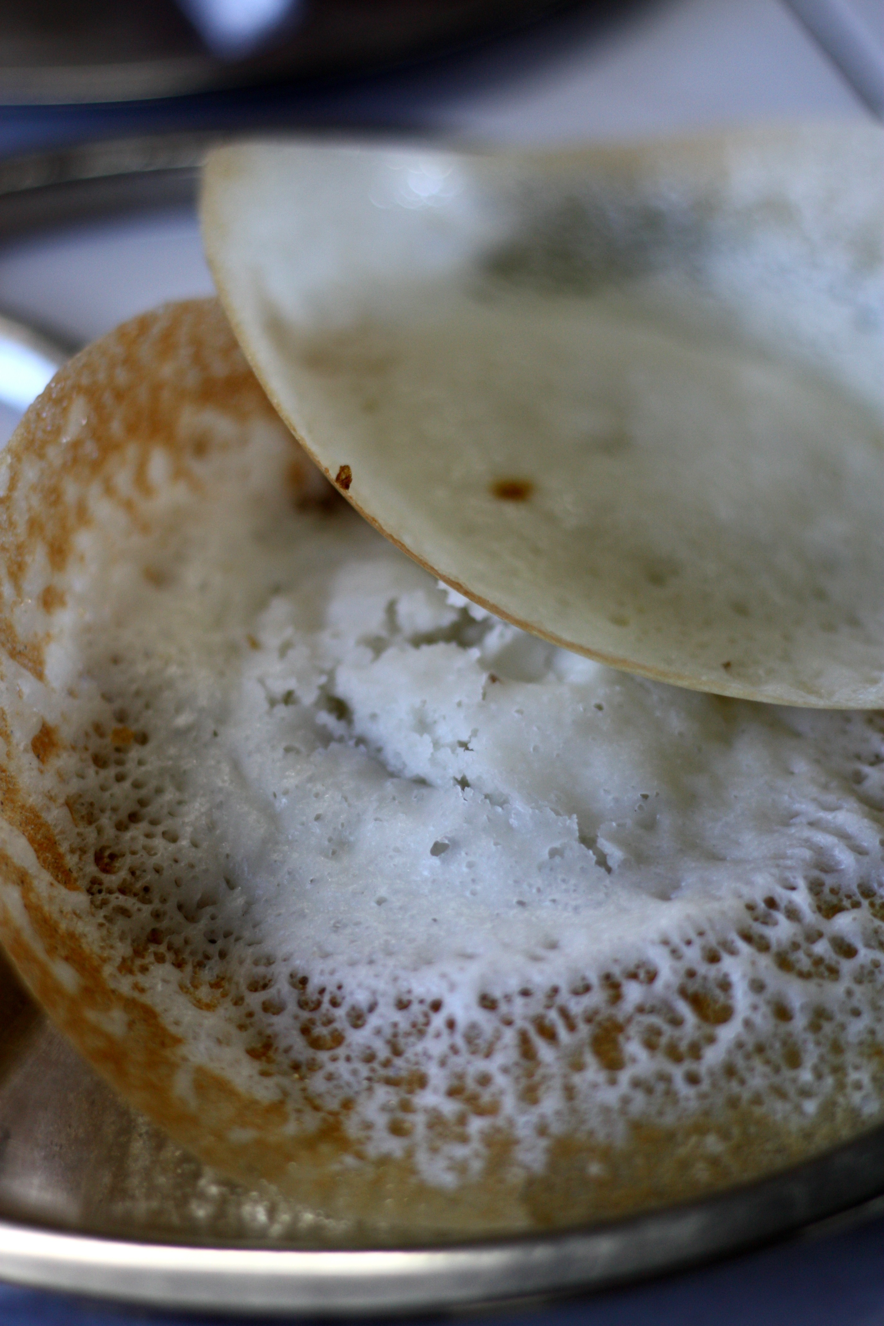 apam manis